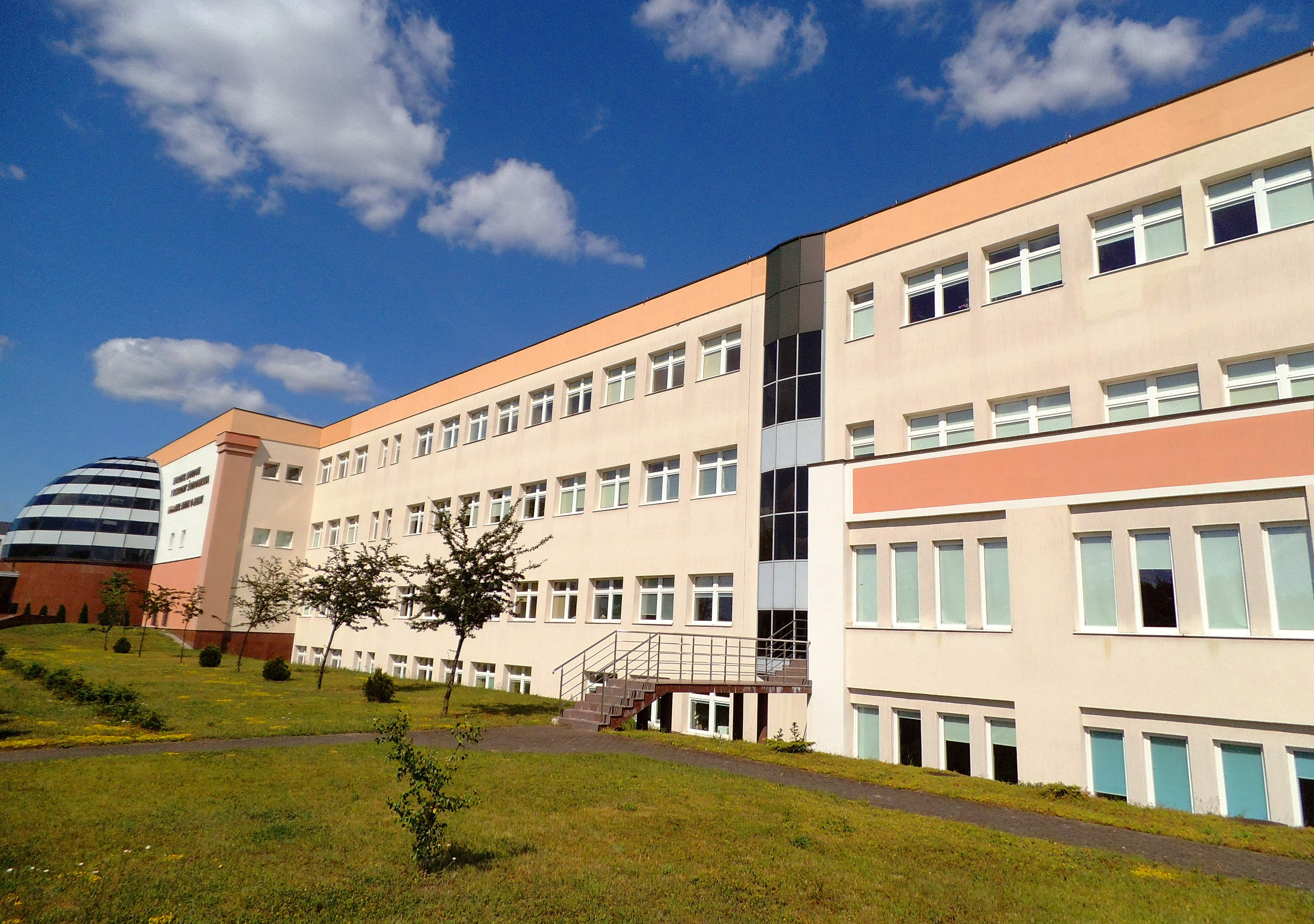 Wydział Biologii i Ochrony Środowiska Uniwersytetu Mikołaja Kopernika w Toruniu